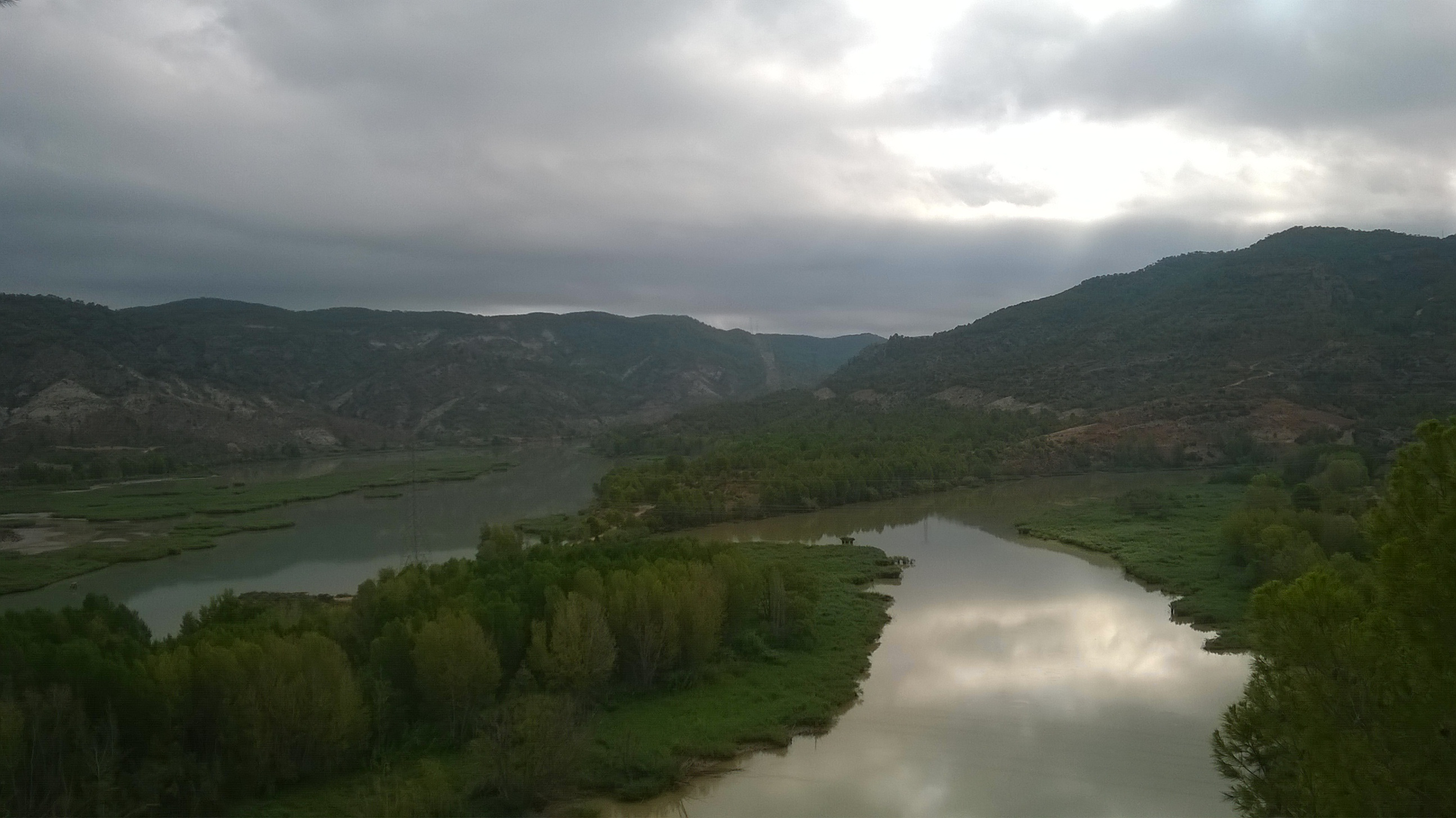 Vistas de Cofrentes tomadas durante el verano de 2014 por Isabel Valiente de la Granja.